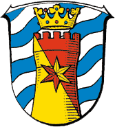 Wappen von Breitenbach am Herzberg